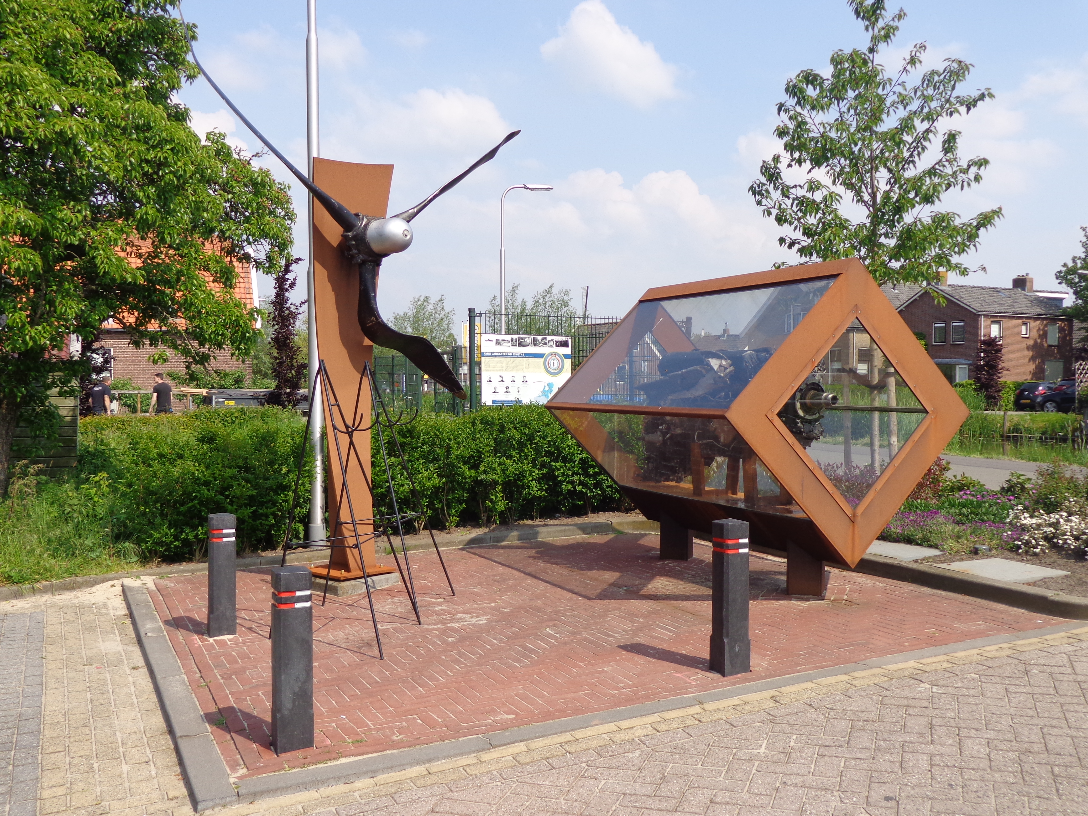 Lancaster ND-559 Monument Brandwijk van kunstenaar Paul Pallandt uit Ottoland. Onthulling op 20 mei 2017